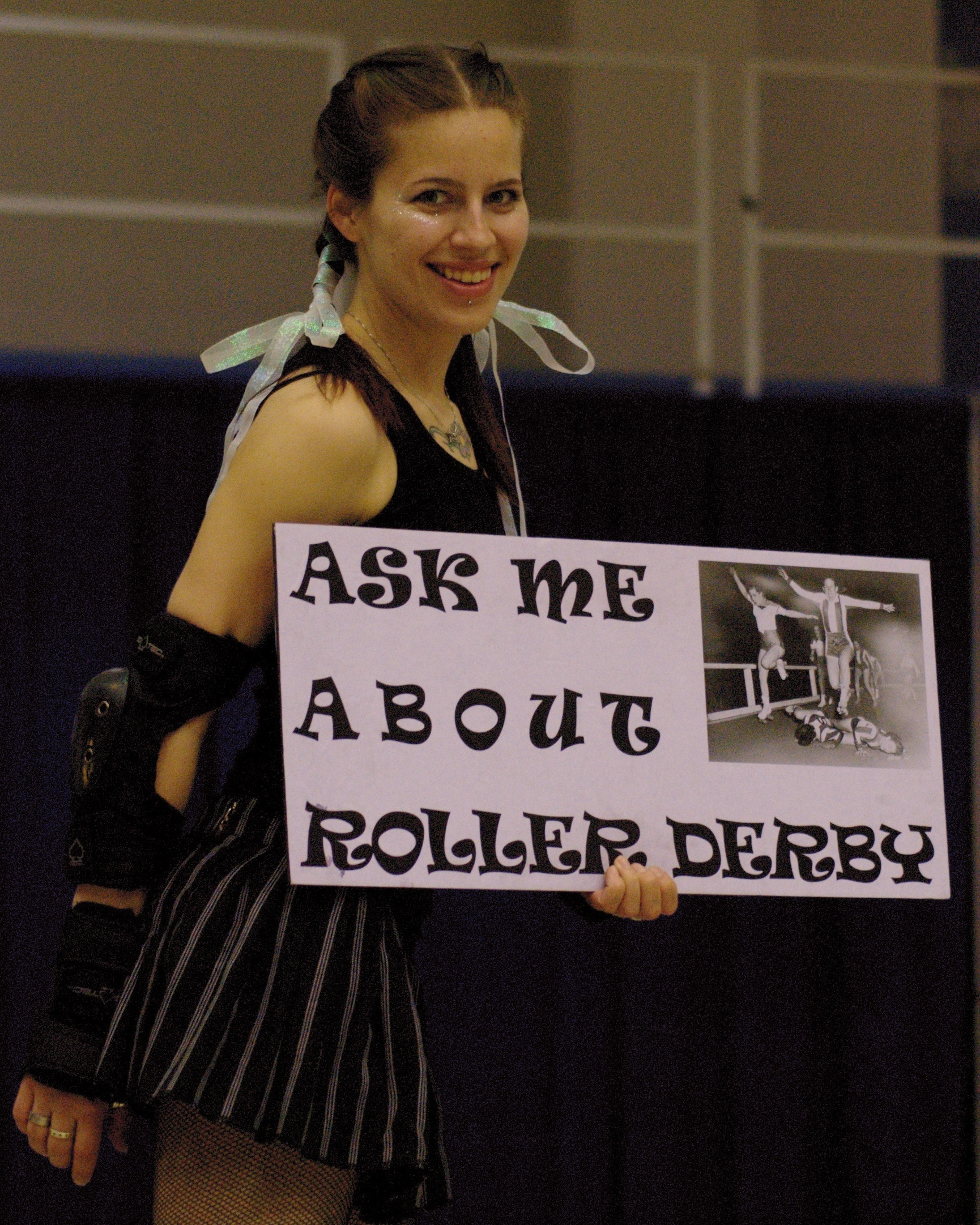 Ask me about Roller Derby